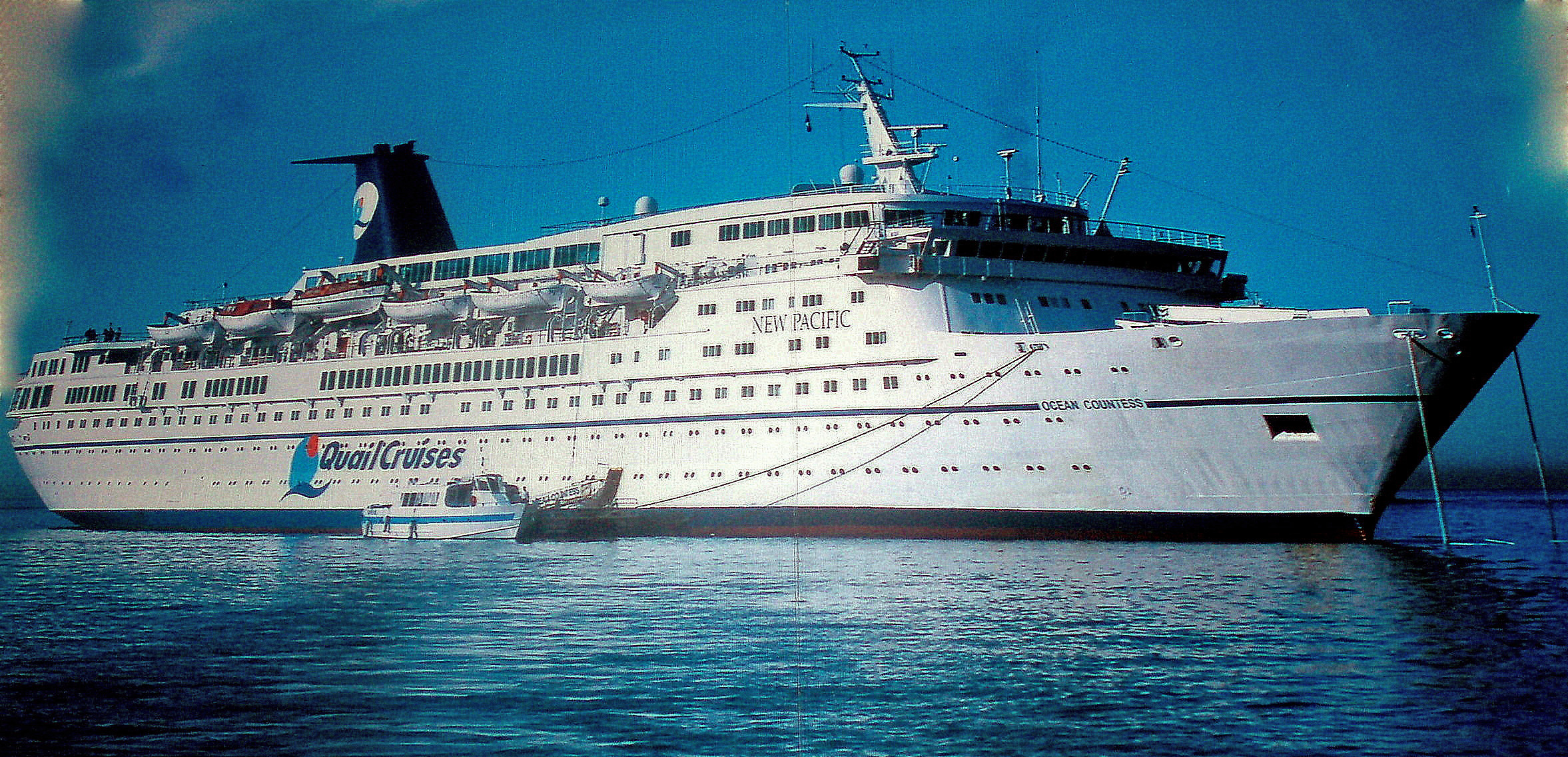 ocean countess fondeado en Villefranc.